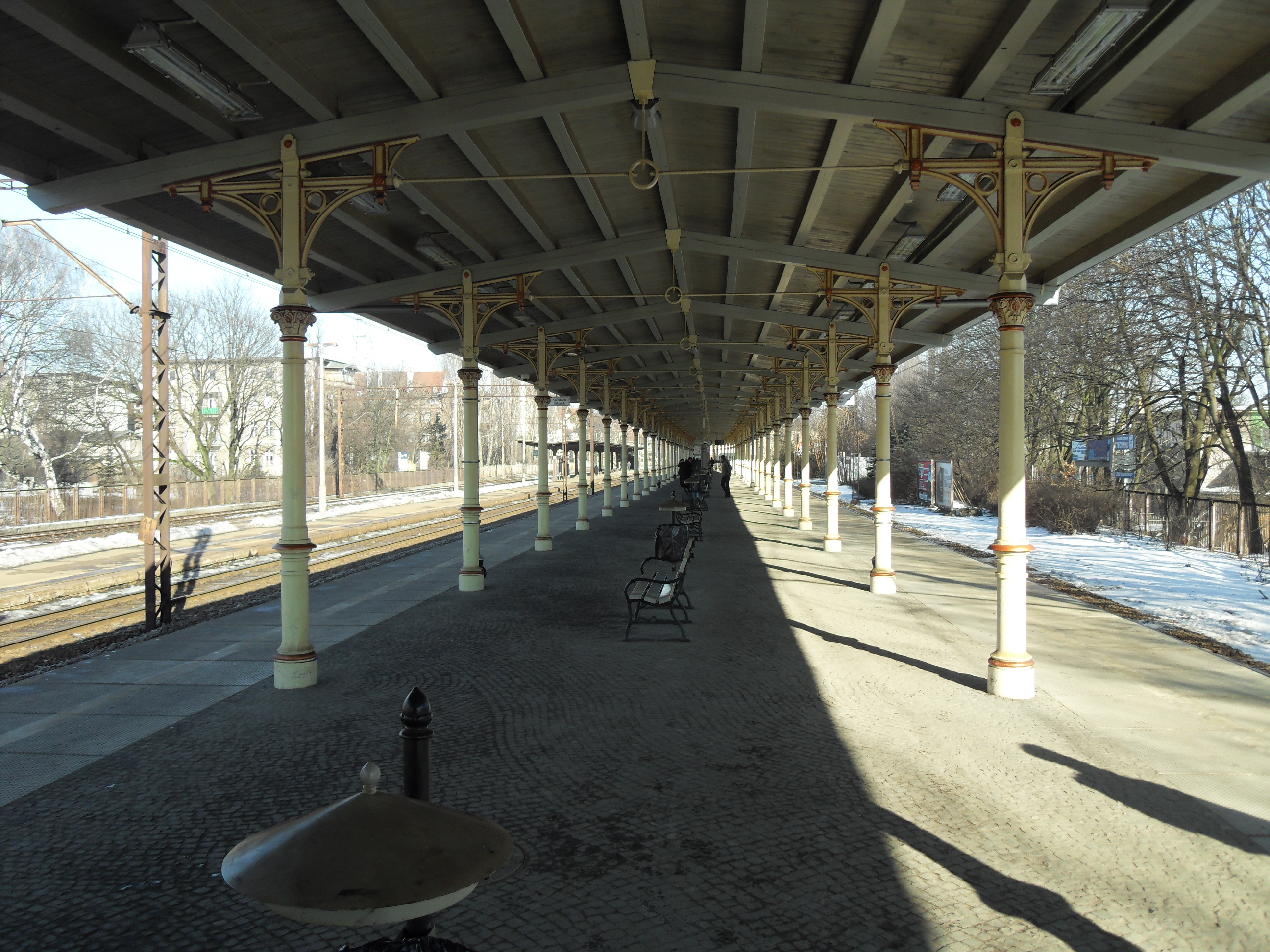 Peron SKM (podmiejski) w Sopocie, po renowacji (widok w kierunku Gdyni).